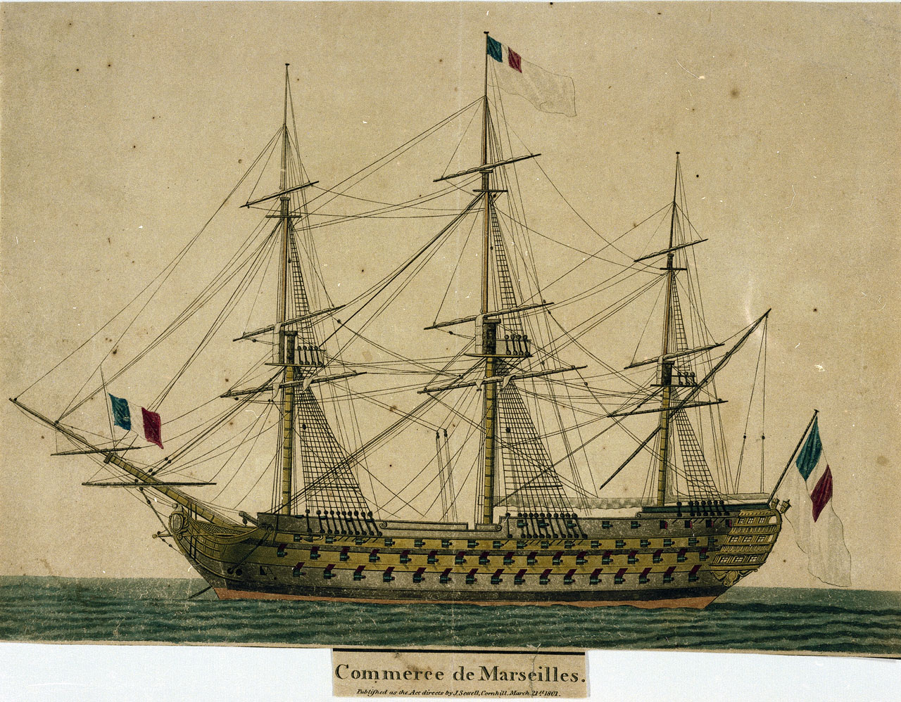 Vaisseau à trois-ponts Commerce de Marseille de plus de 100 canons. Image anglaise publiée en 1801. Curiosité : le vaisseau porte le pavillon royal blanc et les couleurs tricolores. Image qui représente donc le vaisseau au début de la Révolution française et avant la chute de la monarchie (1789-1792).